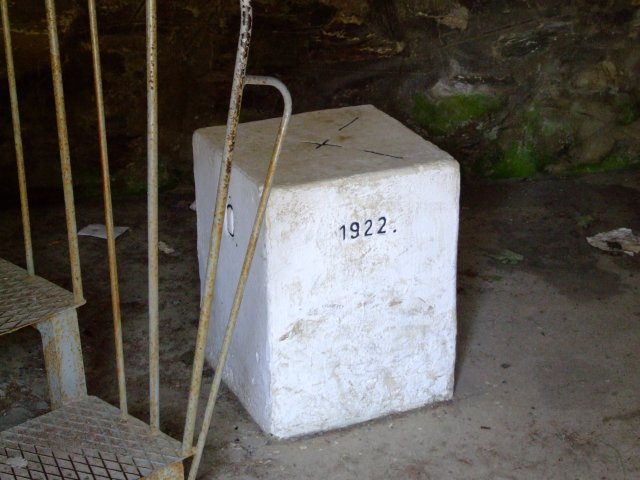 Írott-kői kilátóban lévő határkő